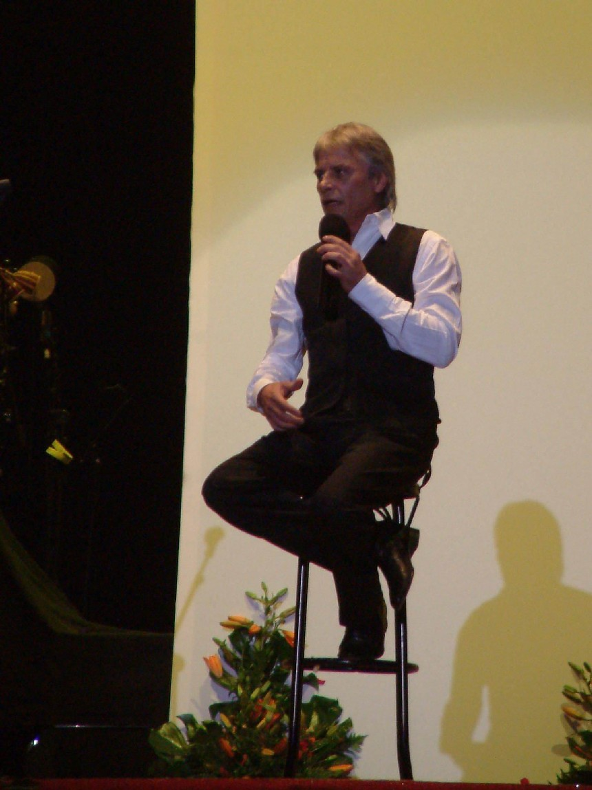 Actuación de Manolo Viera en Santa Cruz de la Palma, con motivo de la Bajada de la Virgen. 1 de junio de 2005.